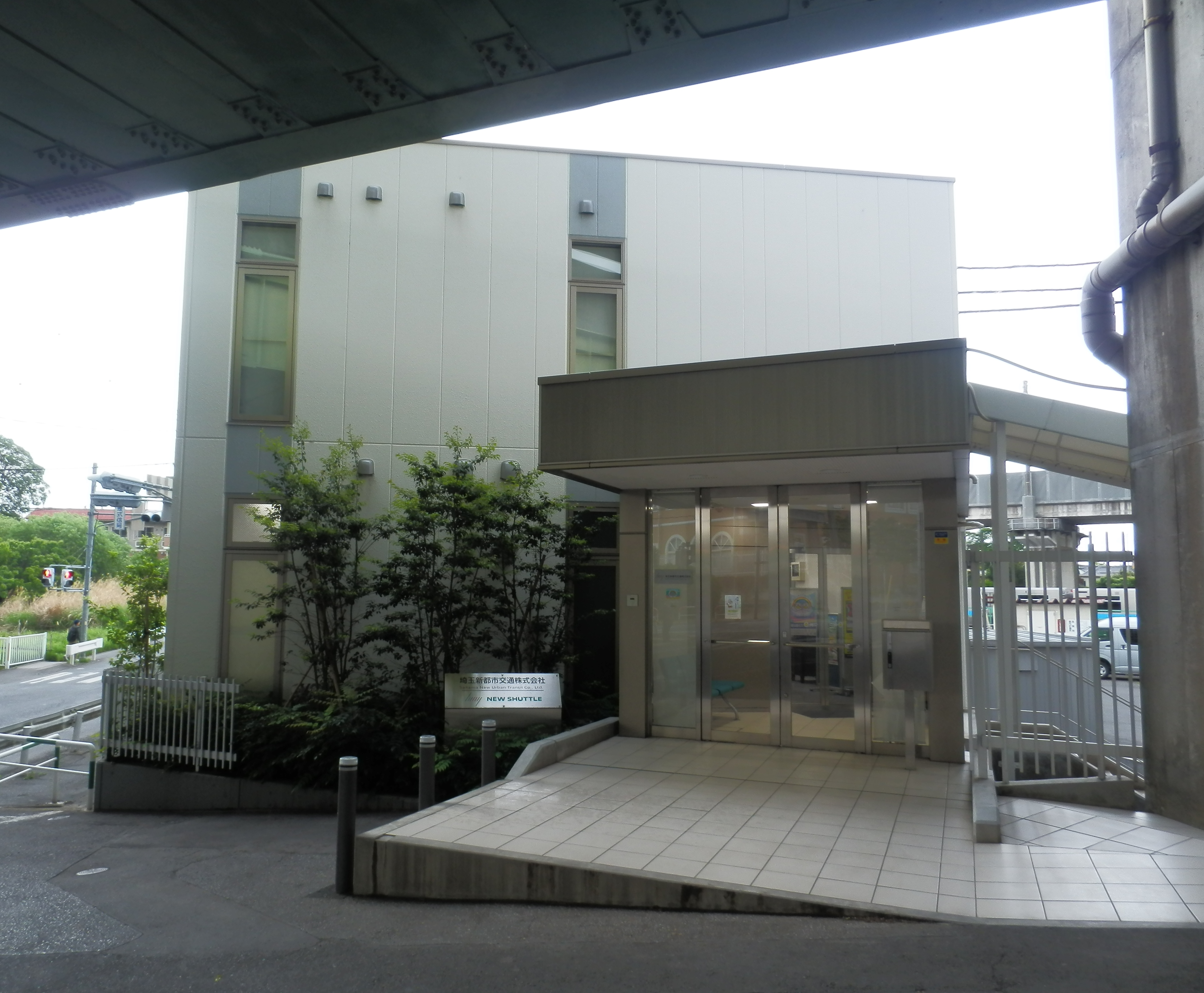 埼玉新都市交通株式会社の本社